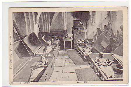 1910 Old images